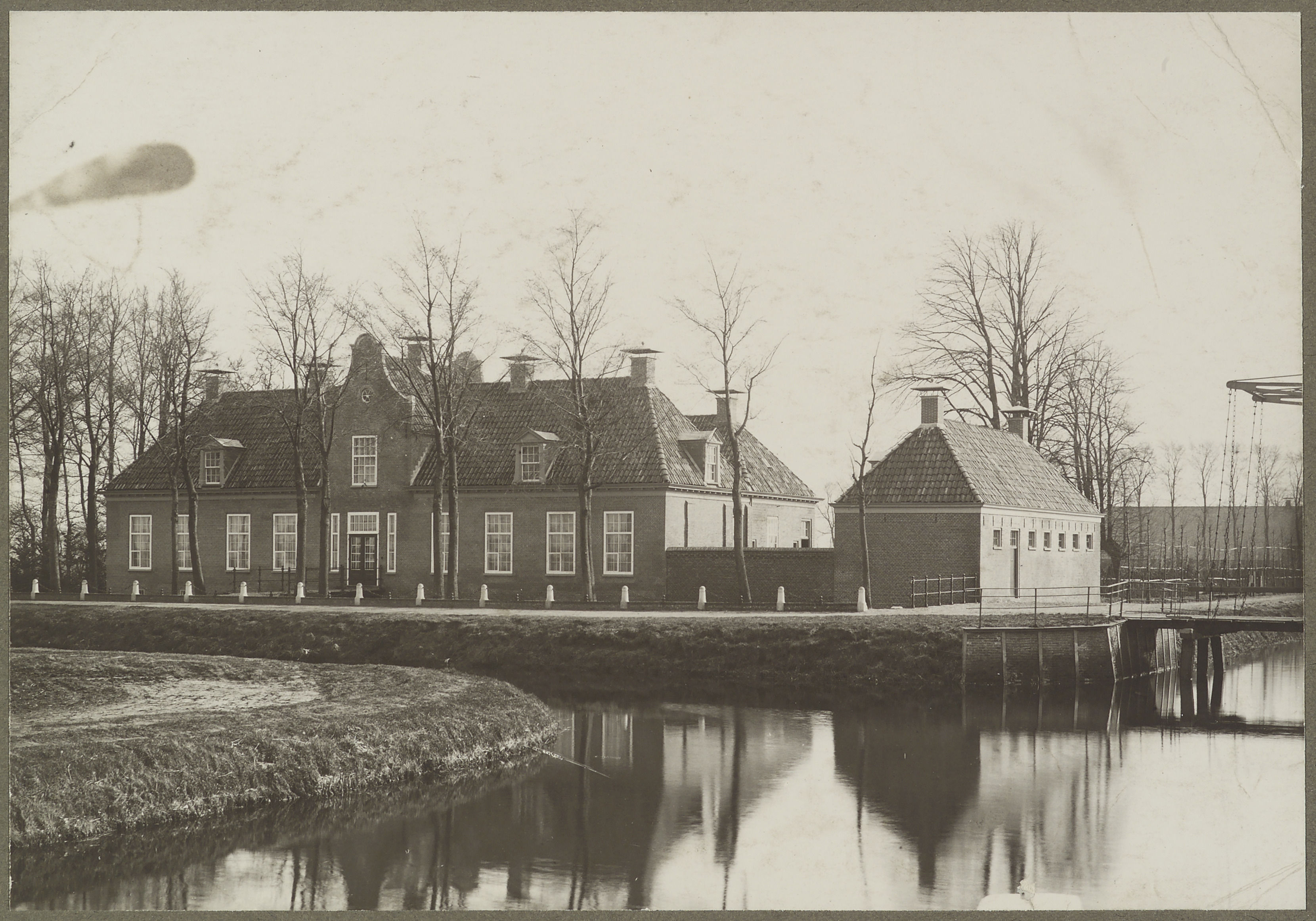 Huize Welgelegen: Overzicht voorgevel en gevel bijgebouw (opmerking: Toegeschreven aan Kramer)